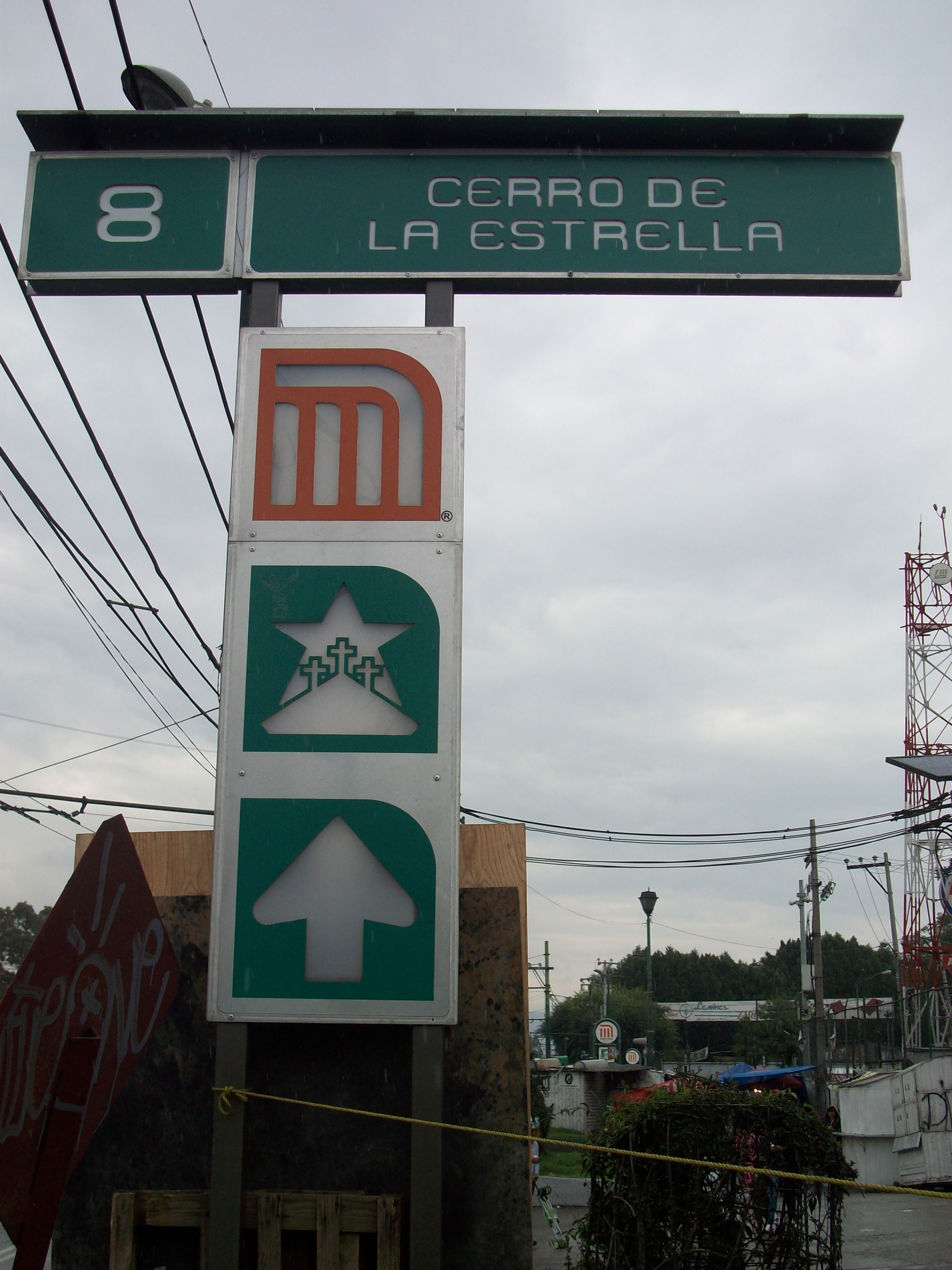 Estela estacion Cerro de la Estrella